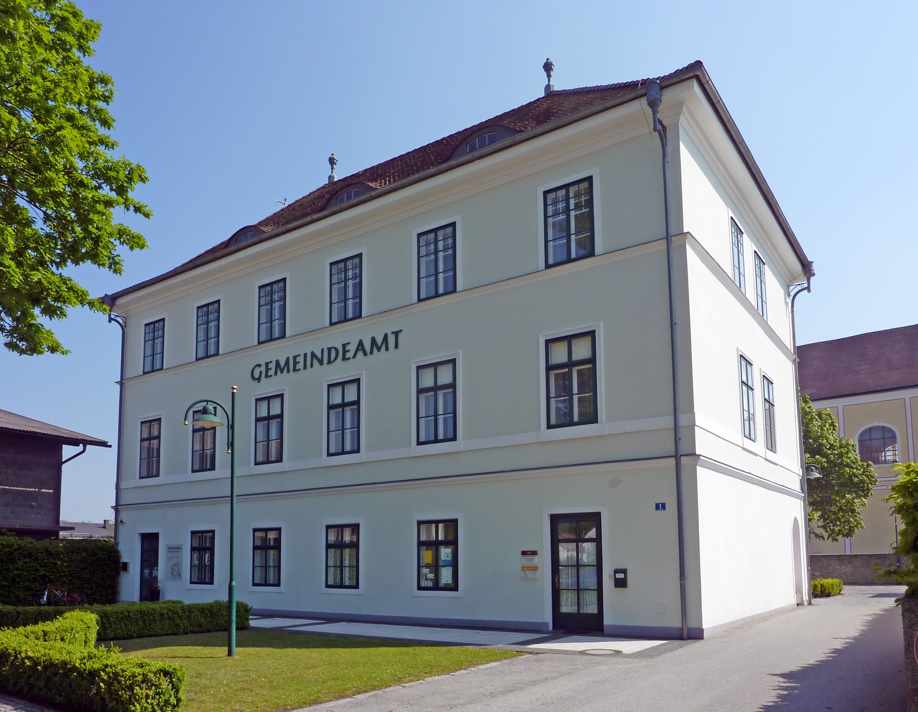 ehem. Schloss, Gemeindeamt, Karlstetten, Niederösterreich